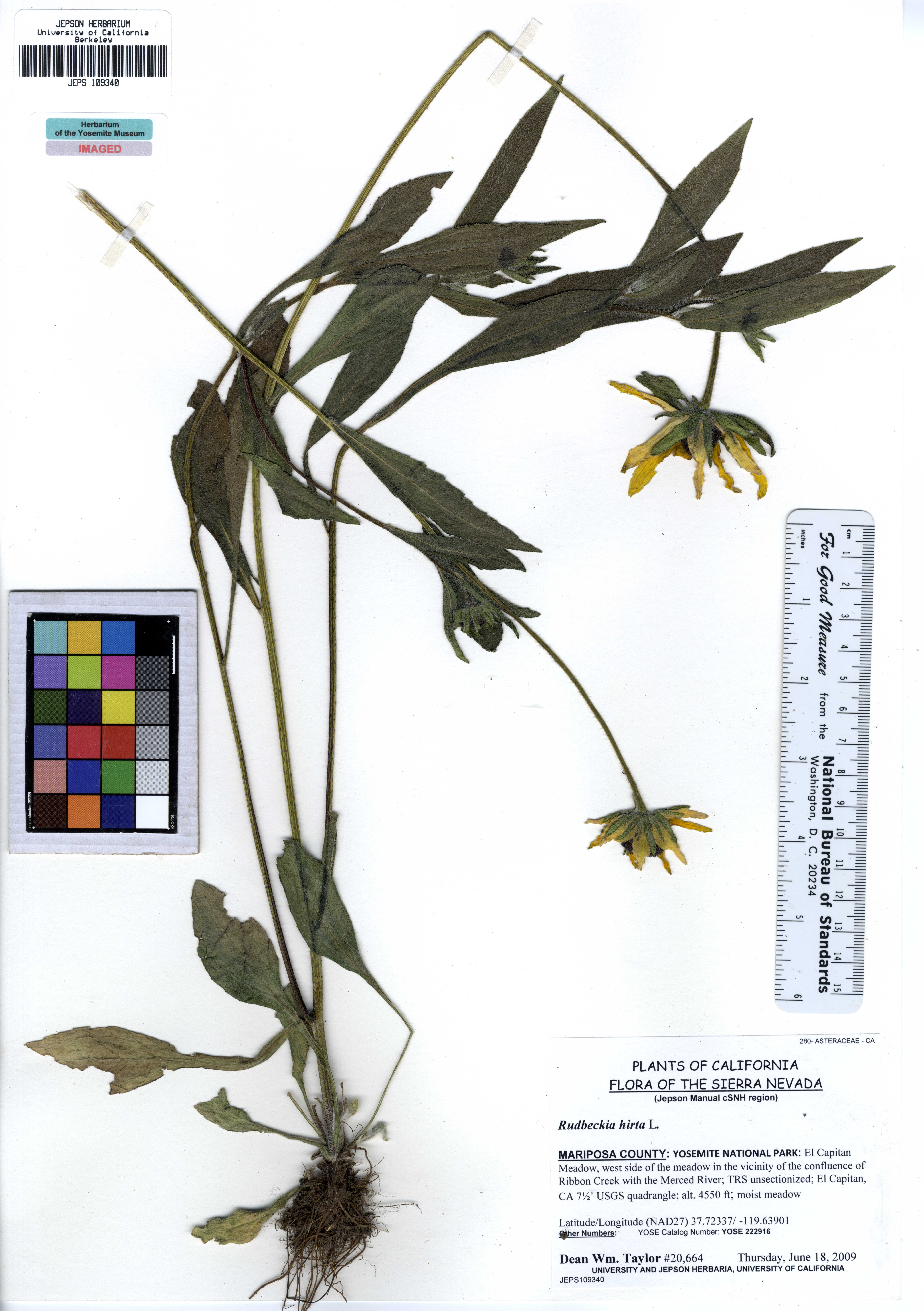 JEPS109340 Rudbeckia hirta